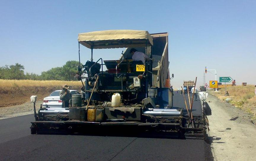 فینیشر درحال پهن کردن آسفالت بر کف جاده در حال احداث